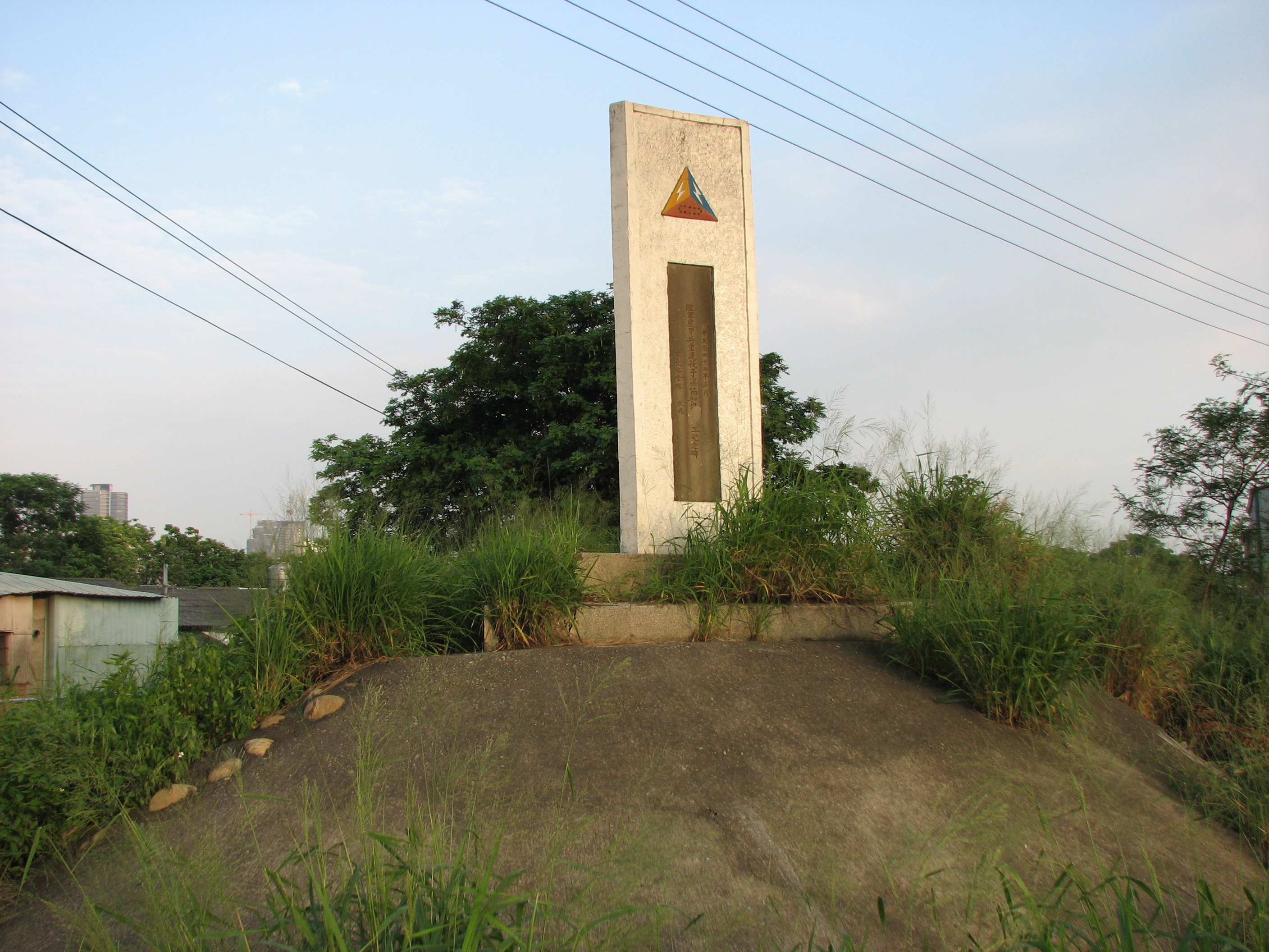 八七水災後中華民國陸軍裝甲兵重建筏子溪協和堤防竣工紀念碑